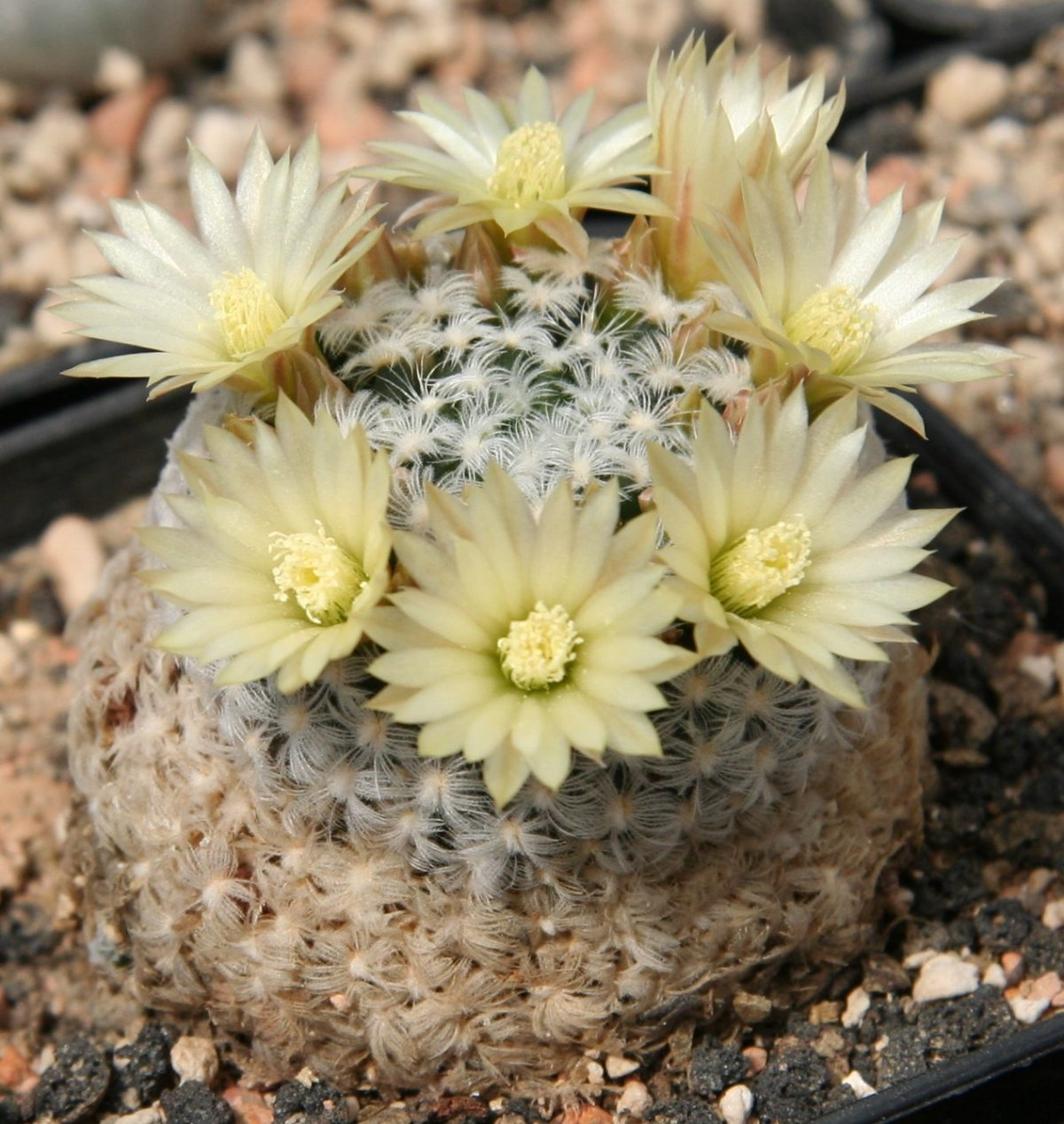 Mammillaria duwei, ohne Mitteldorn